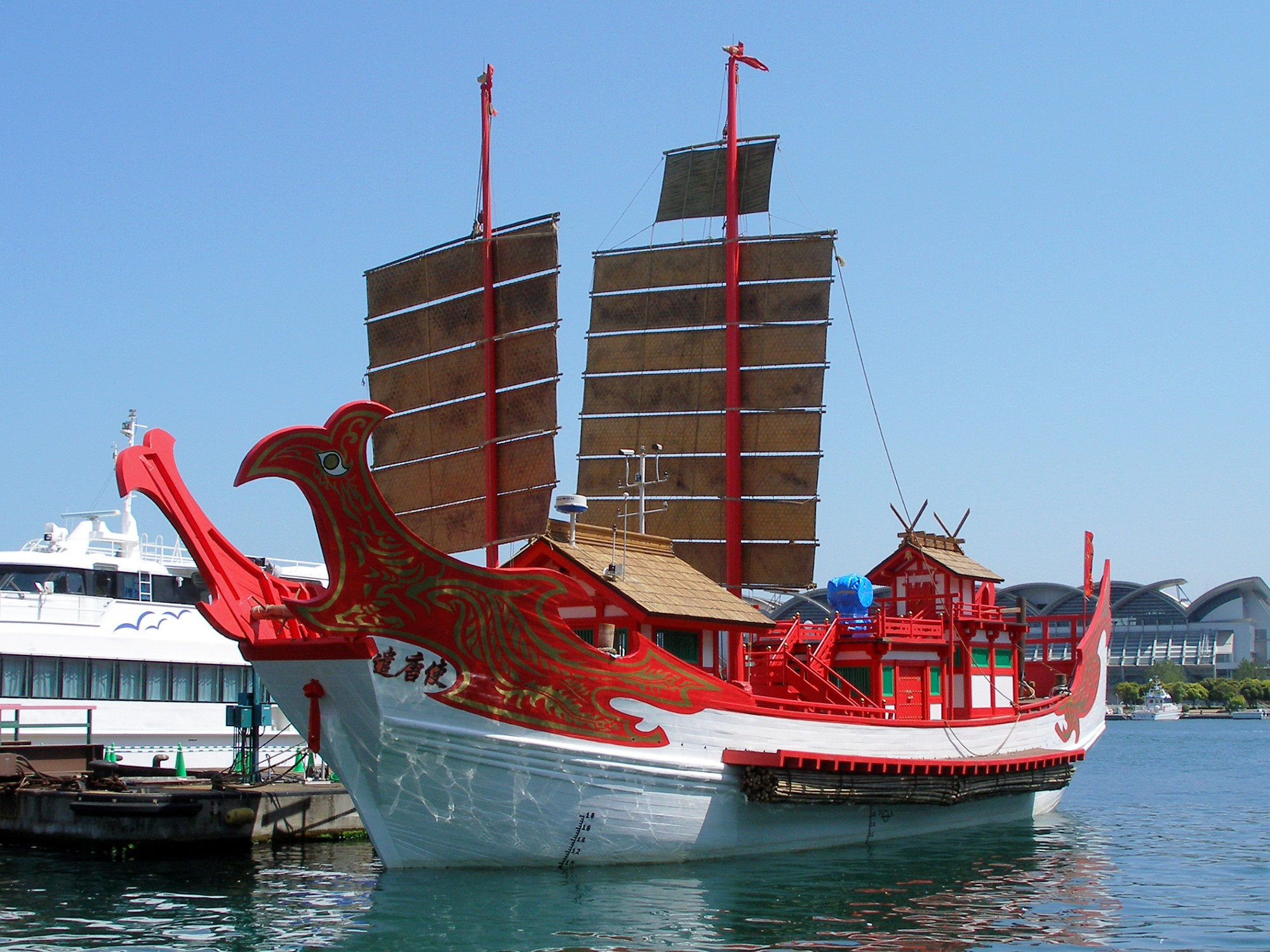 2010年、上海万博に合わせ「遣唐使船再現プロジェクト」に際して復元された遣唐使船。博多港にて、2010年5月14日撮影。